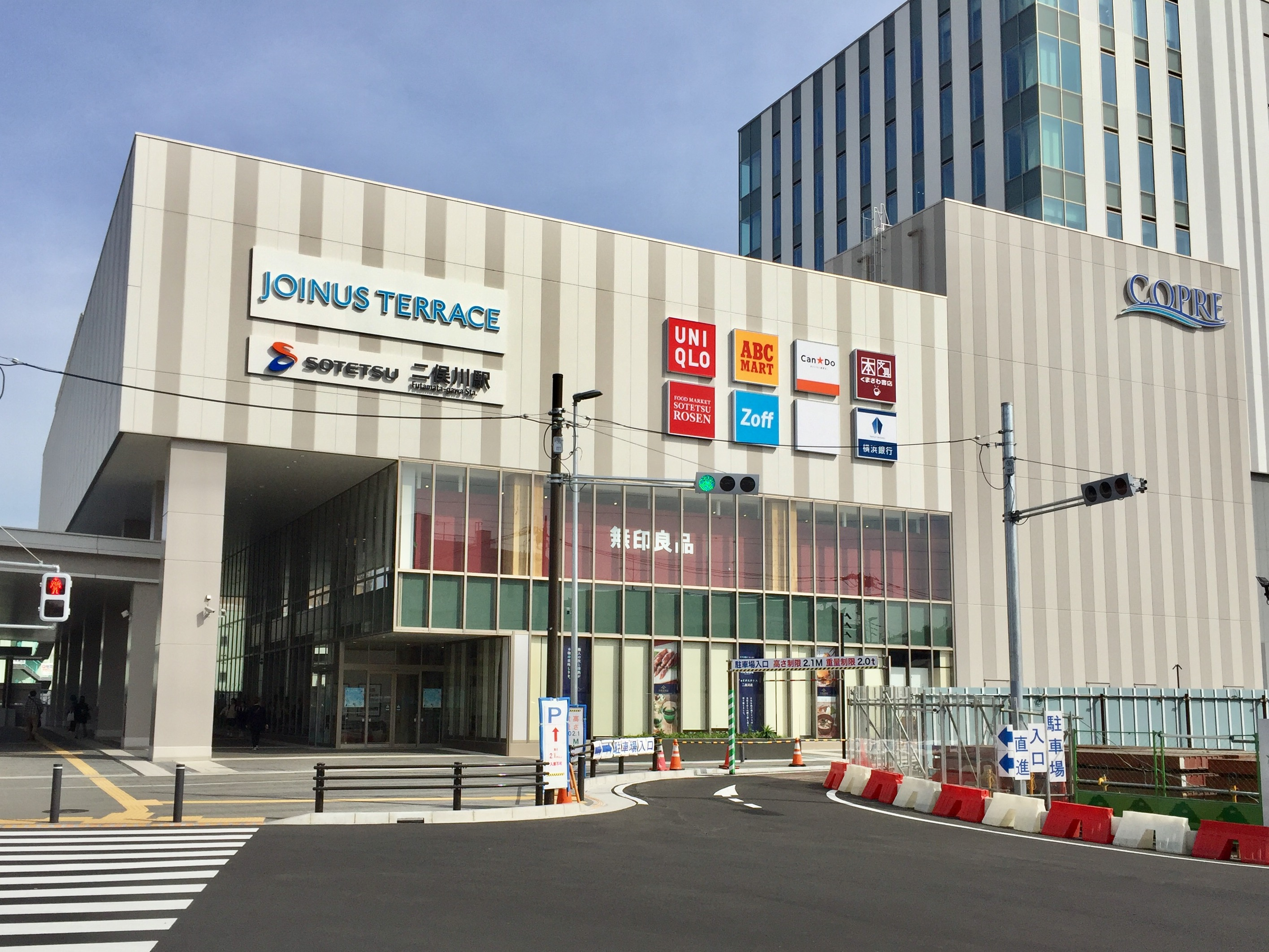 COPRE 二俣川の商業棟「JOINUS TERRACE 二俣川」の外観（南側より撮影）。